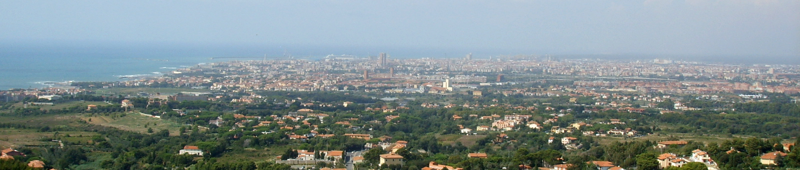 Livorno: veduta della città dal colle di Montenero.